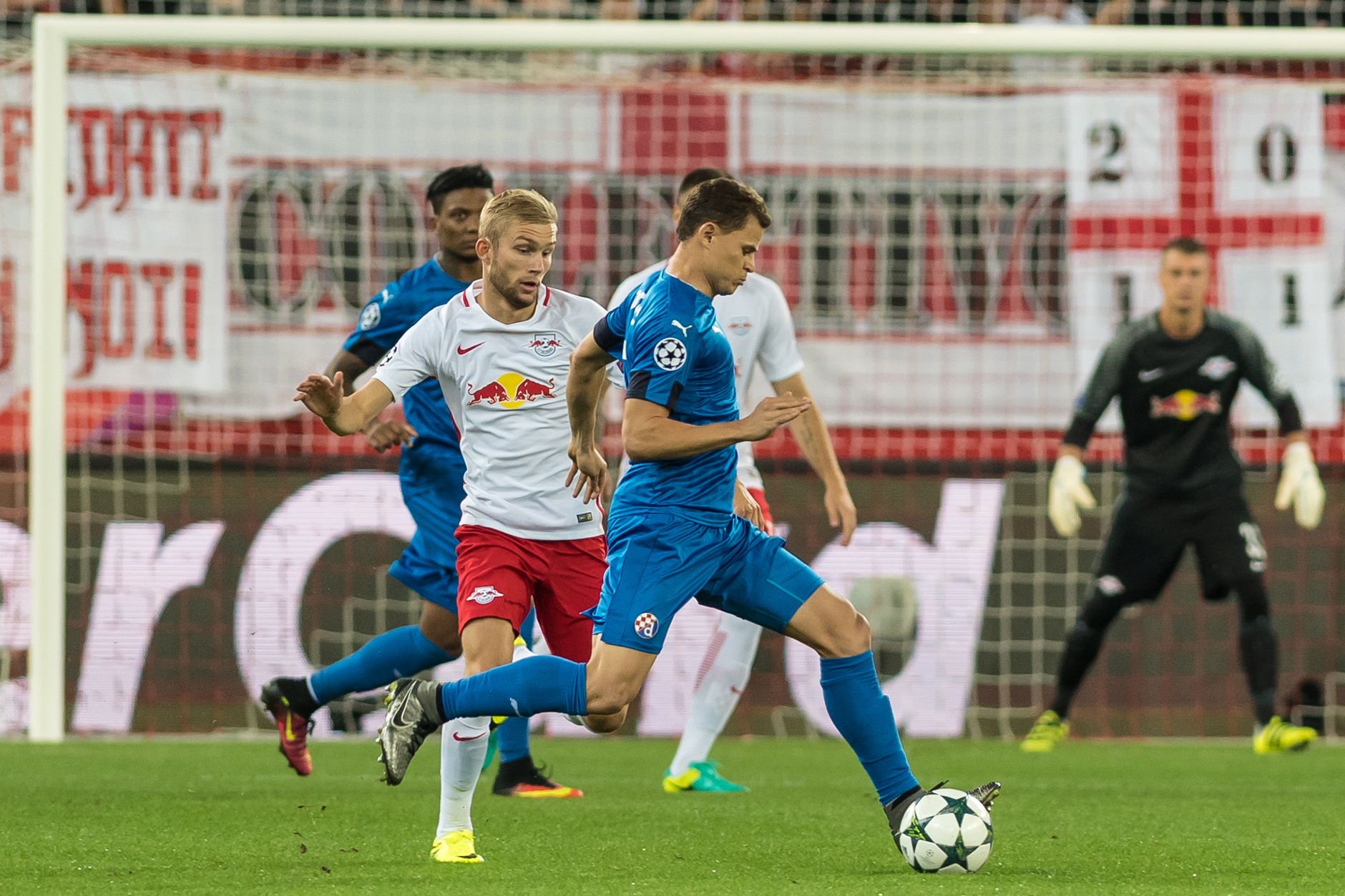 UEFA Champions League - Play-Offs - FC Salzburg vs Dinamo Zagreb. Bild zeigt Jonas (Dinamo Zagreb) und Konrad Laimer (RBS).